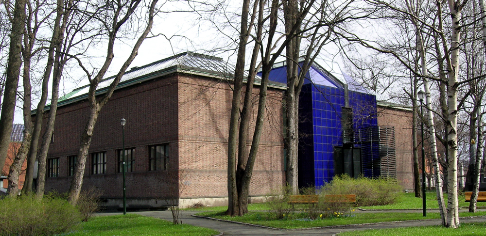 Trondheim kunstmuseum sett fra Haakon VIIs plass. Bygd 1930; arkitekt Peter Daniel Hofflund. Tilbygget i atriet fra 1986; arkitekt Ola Steen Arkitektkontor.